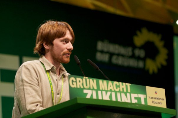 Karl Bär auf der Bundesdeligiertenkonferenz von Bündnis90/Die Grünen 2009 in Rostock